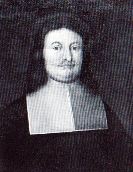 Hermann Brandis war Sälzeroberst, Bürgermeister und Geschichtsschreiber. Das Bild entstand 1670.